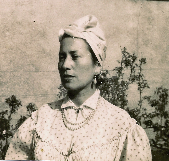 Photo de Dominique Rolin